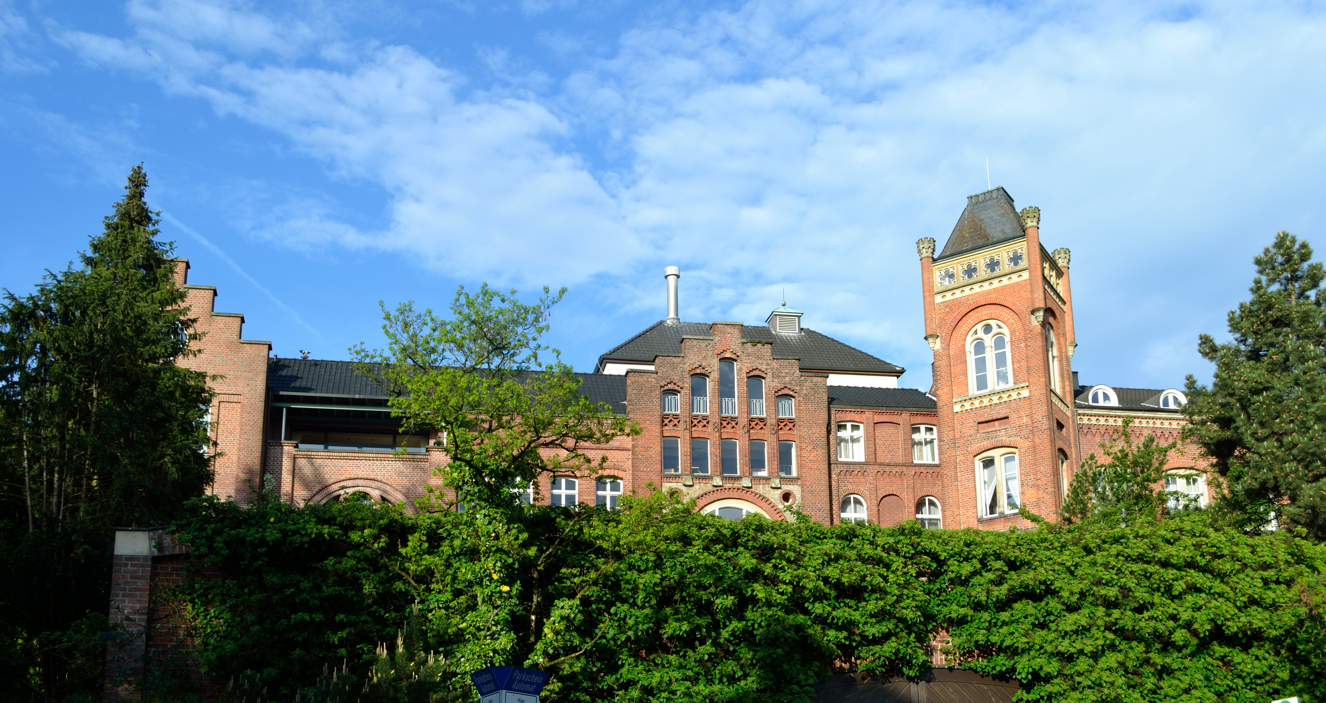 Fassade der Strate-Brauerei This is a photograph of an architectural monument.